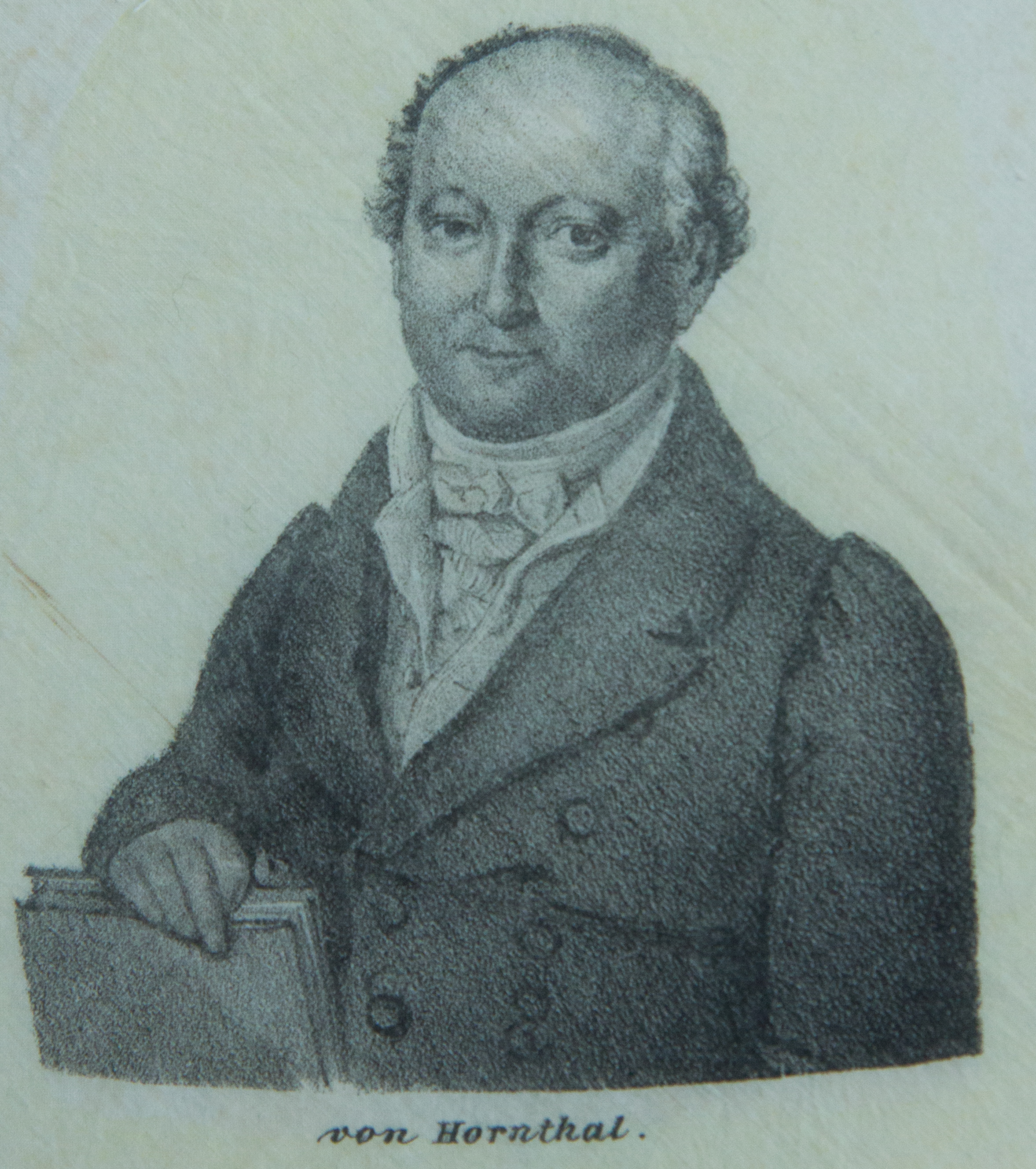 Hambacher Tuch, fotografiert im Archiv des Liberalismus in Gummersbach: Franz Ludwig von Hornthal (1760-1833)